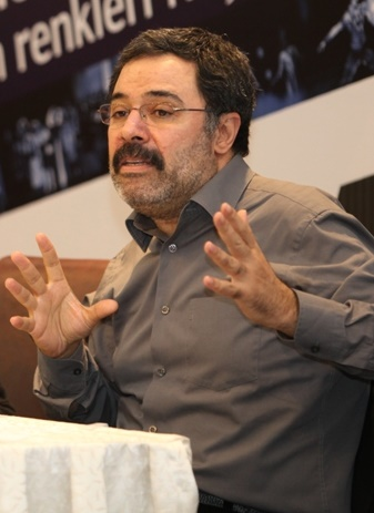 Ahmet Ümit